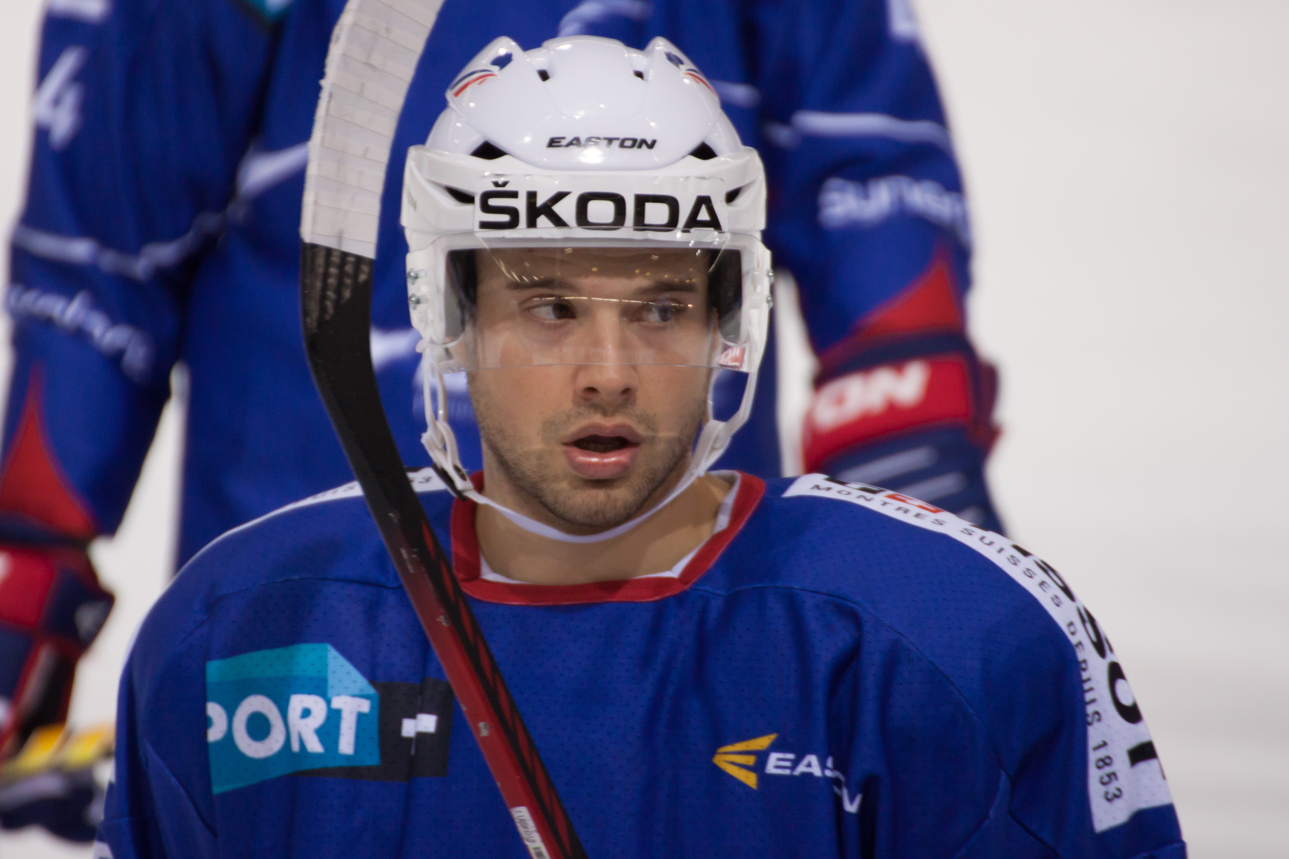 Teddy Da Costa lors du match France-Norvège à la patinoire Pole Sud de Grenoble.